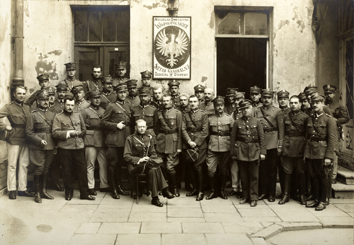 IV Oddział Sztabu Generalnego Naczelnego Dowództwa WP (ok. 1920 r.)